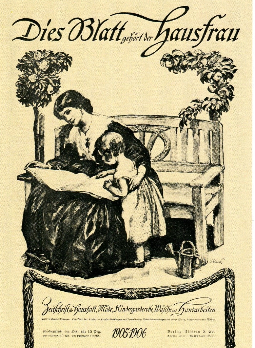 Titelblatt der Zeitschrift Dies Blatt gehört der Hausfrau. (Das Titelbild des Malers Paul Rieth zierte die Zeitschrift ein Jahr lang.)